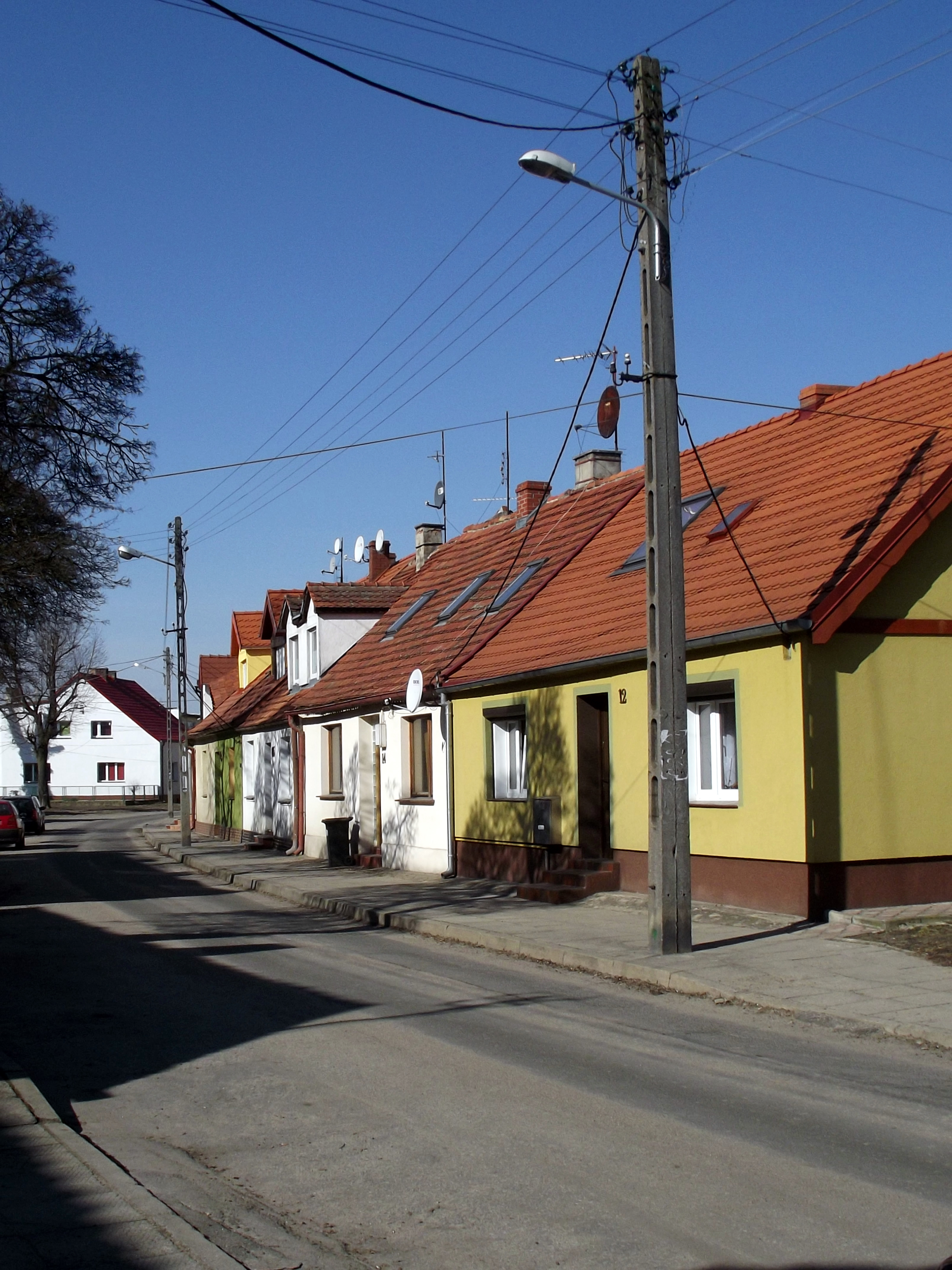 Ulica Winnica z fragmentami zabudowy XIX-wiecznej